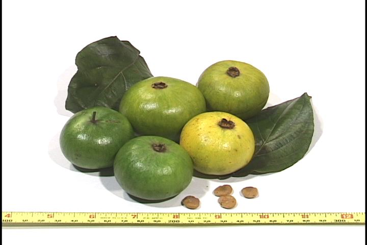 Foto de la especia vegetal Campomanesia lineatifolia